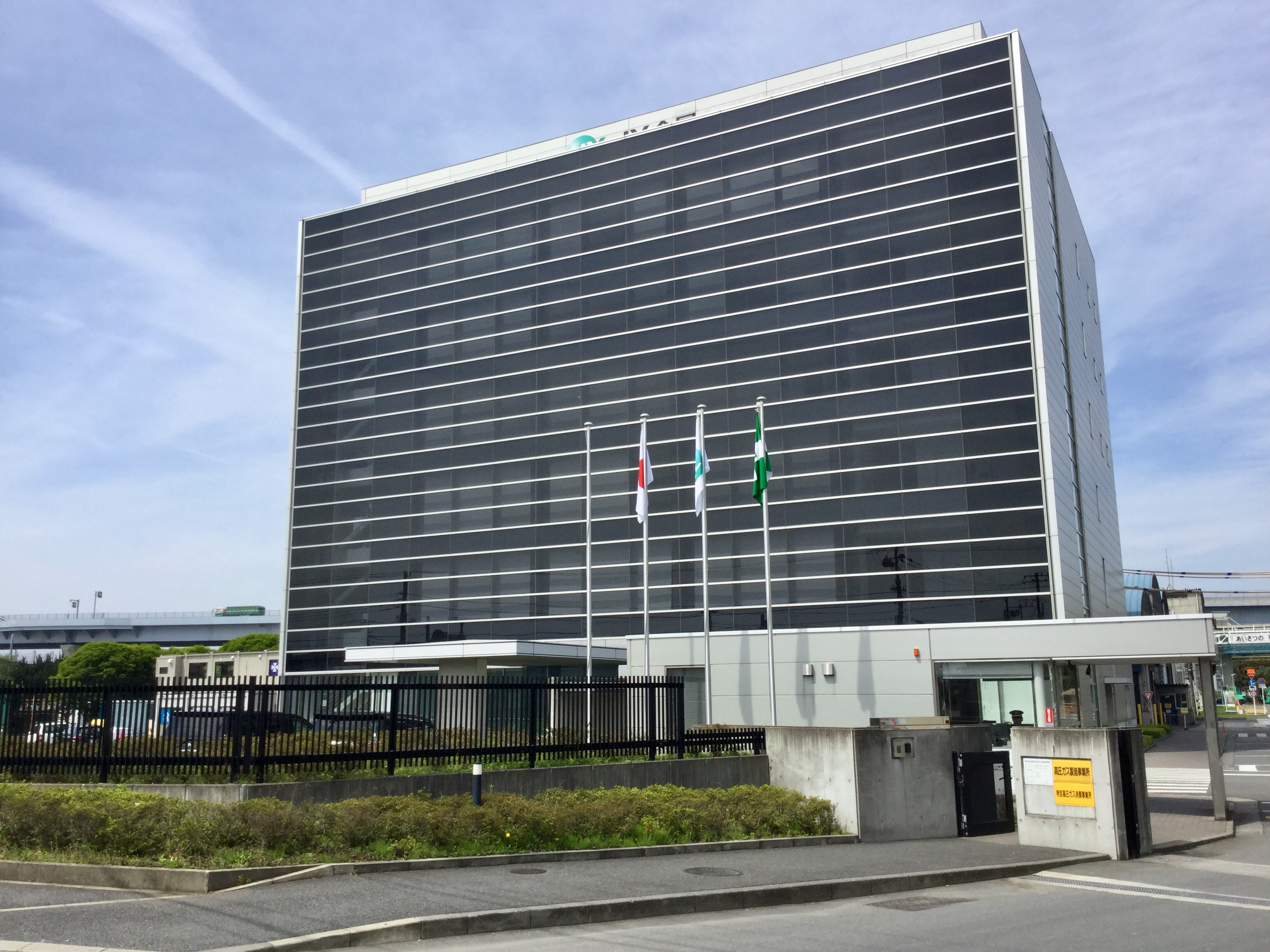 JX金属倉見工場オフィスビル